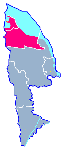 Locator maps for communes in województwo zachodniopomorskie : Nowe Warpno gm.png (podział na gminy)